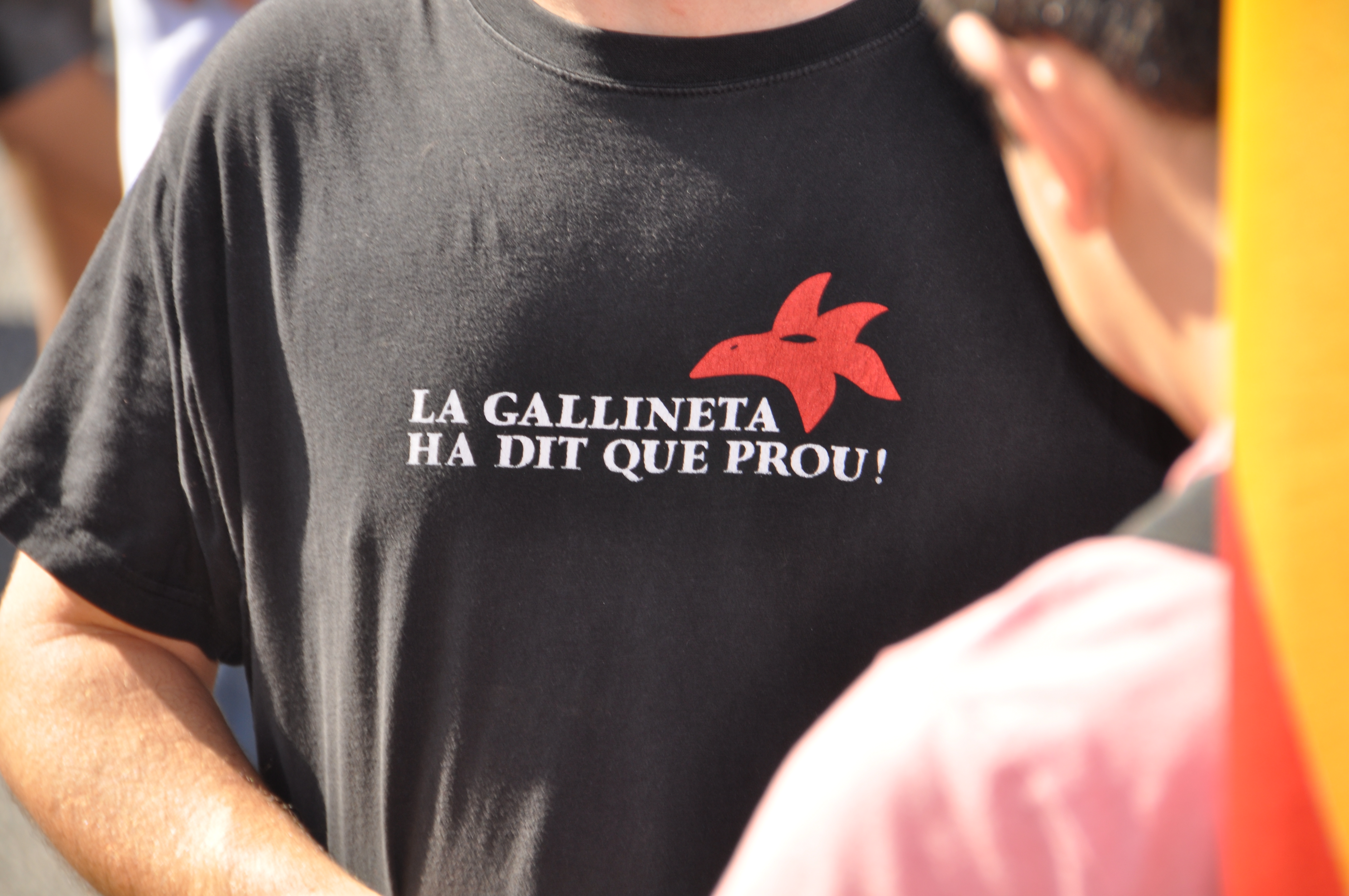 Samarreta especial per a la manifestació del 10J